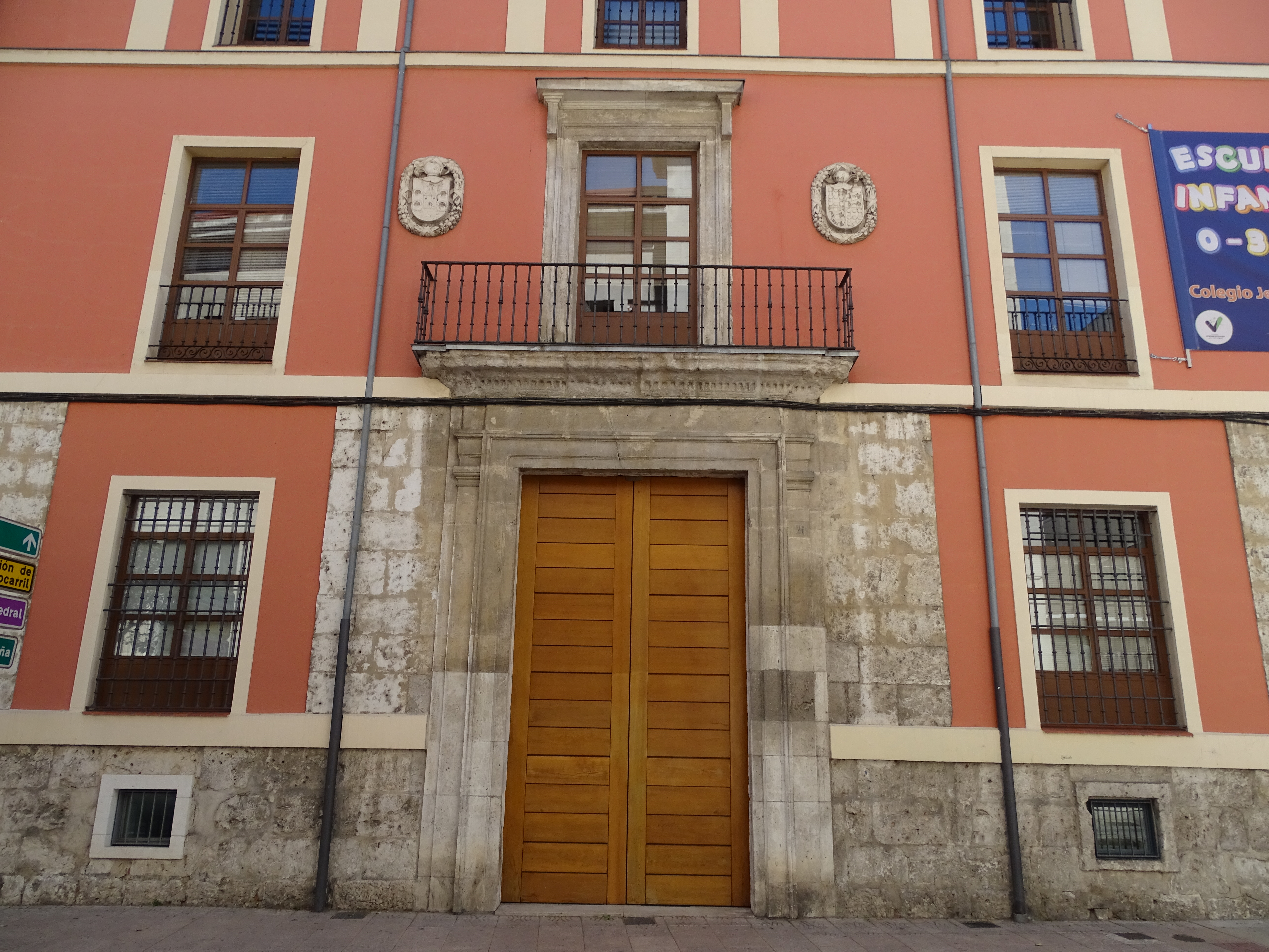 Casa palacio de Luis de Vitoria en Valladolid, España.